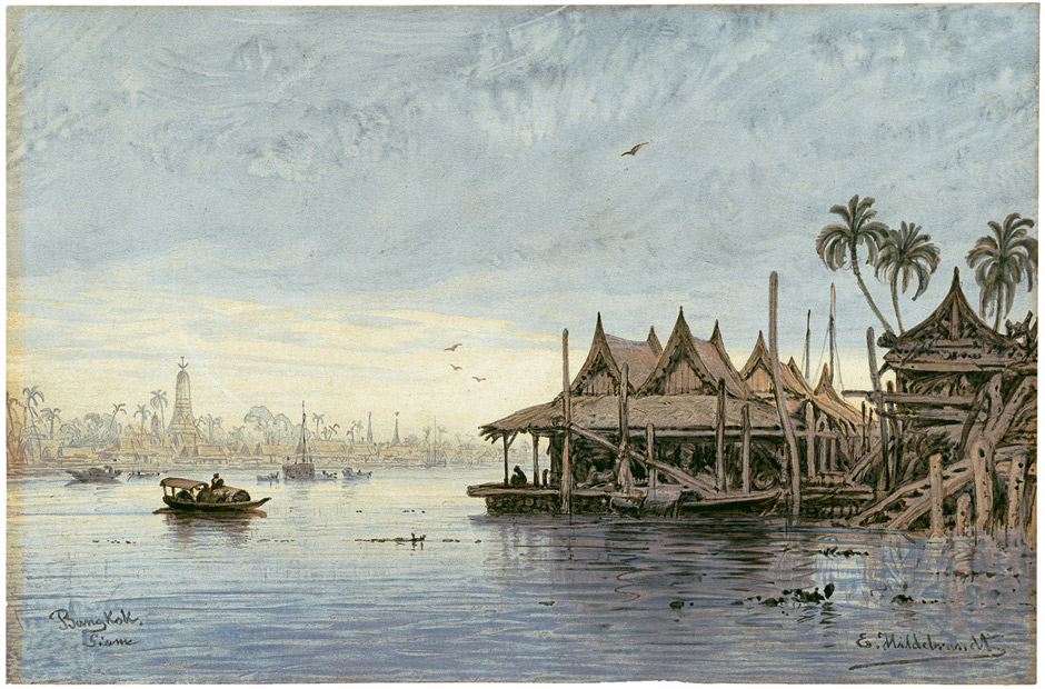 Blick auf Bangkok. Aquarell über Bleistift auf dünnem Karton. 24,2 x 36,8 cm. Unten rechts signiert "E. Hildebrandt" und links betitelt "Bangkok / Siam".